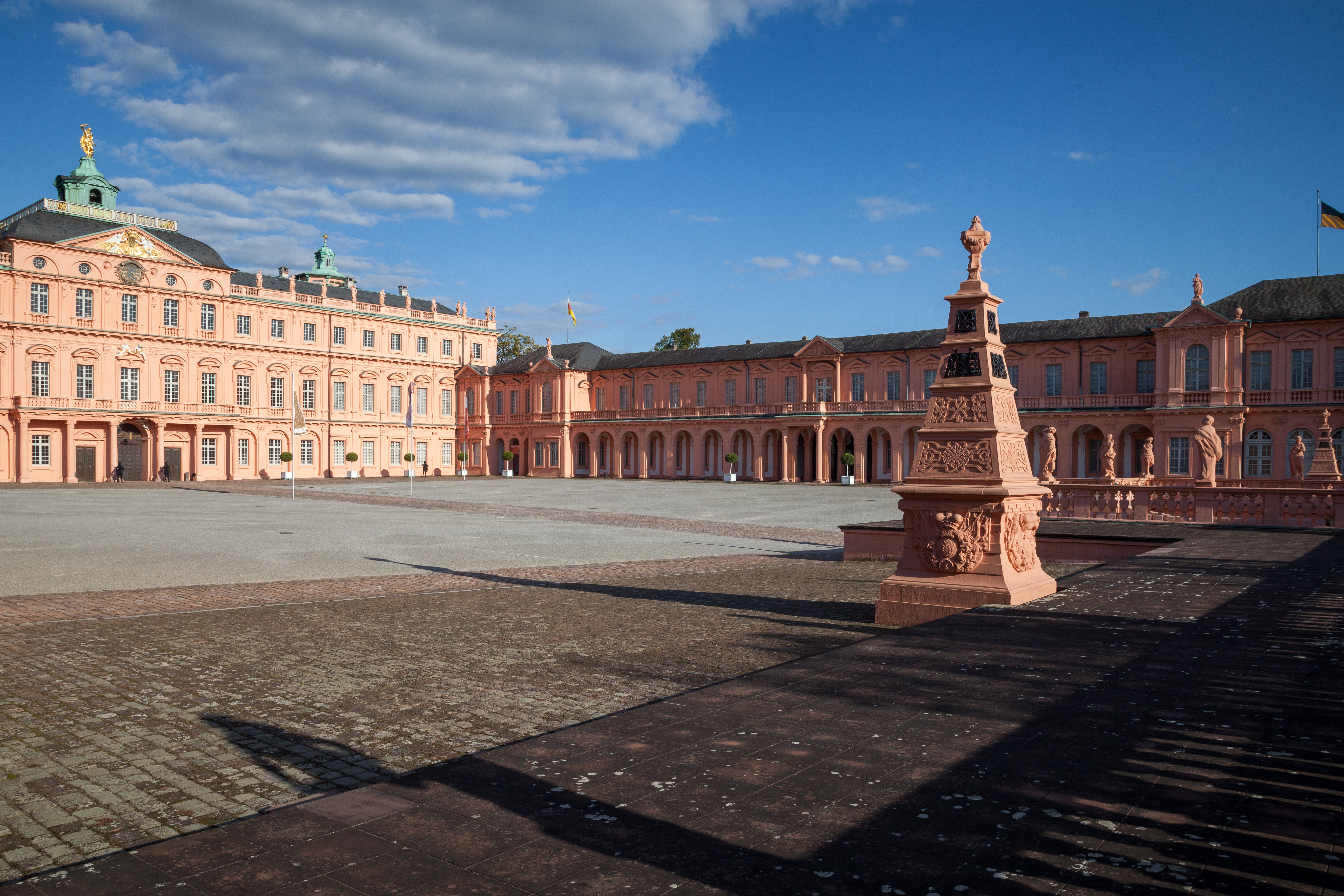 Seitlicher Blick vom Ehrenhof des Rastatter Schlosses